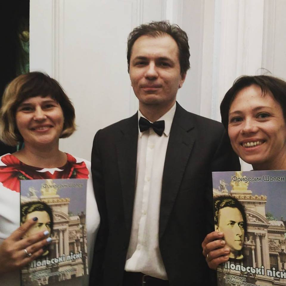 Тетяна Череп-Пероганич, Андрій Бондаренко та Анна Багряна з першими примірниками видання Пісні Ф.Шопена - українською